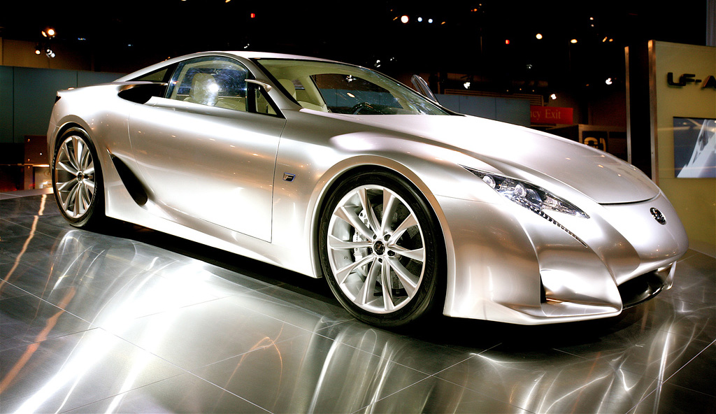 Lexus LF-A